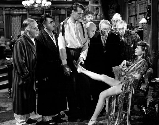 1941年製作の映画「教授と美女」の広告用写真